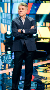 Алексей Пиманов на конкурсе «Новая звезда»